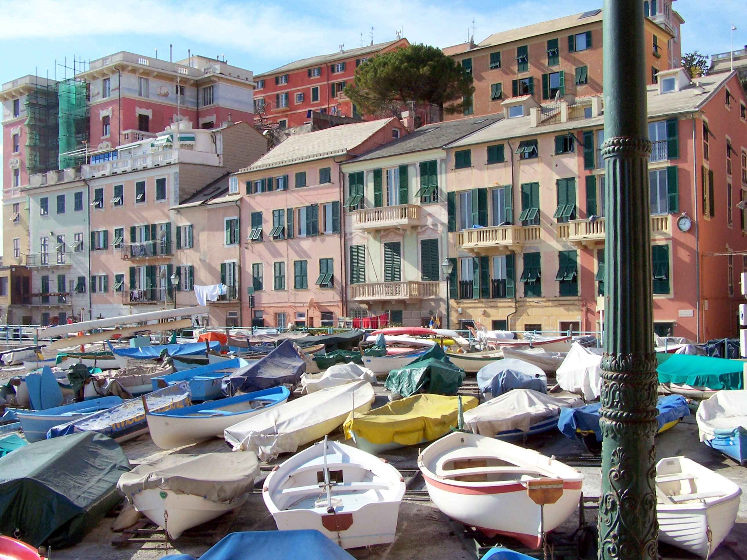 Genova, quartiere di Sturla, il borgo di Vernazzola